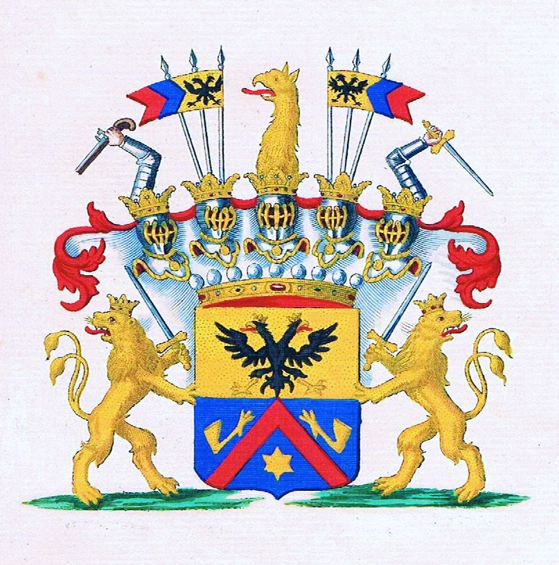 Wappen der Grafen von Desfours, original altkolorierter Wappen-Kupferstich im Fürstenkolorit